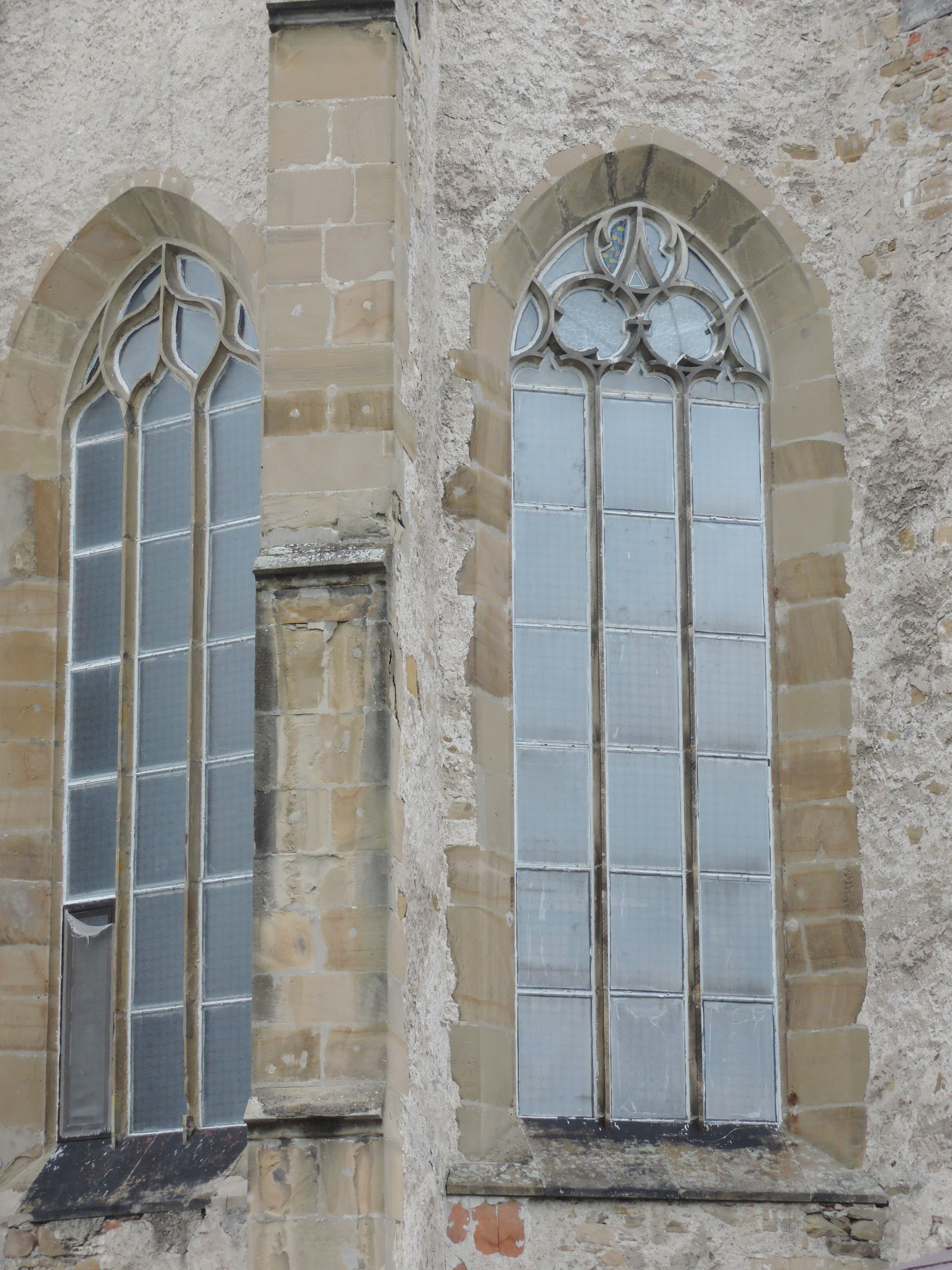 trojpólové gotické okno